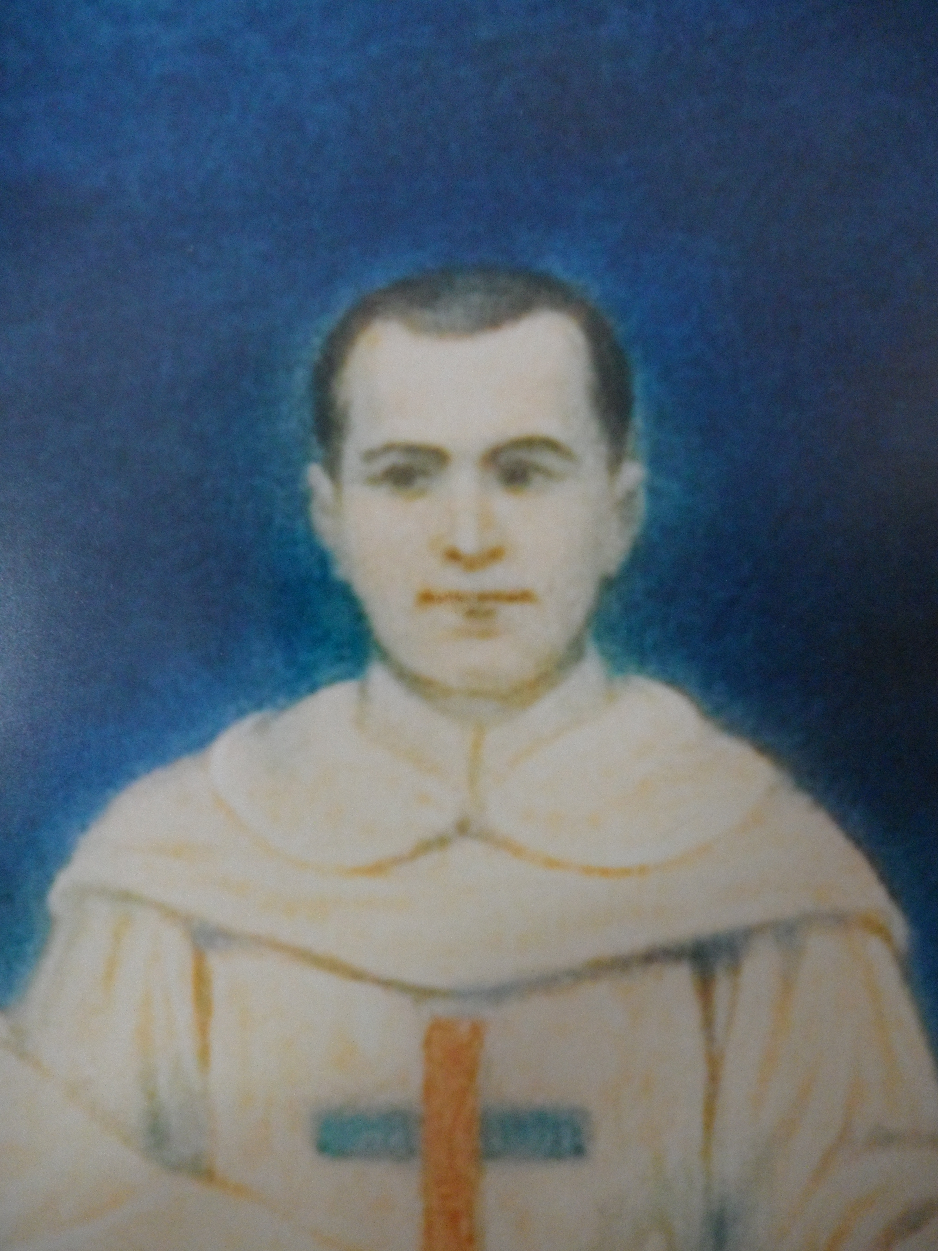 Particular del lienzo con motivo a la beatificación de Mariano de San José y compañeros mártires trinitarios. Convento de San Carlo alle Quattro Fontane.